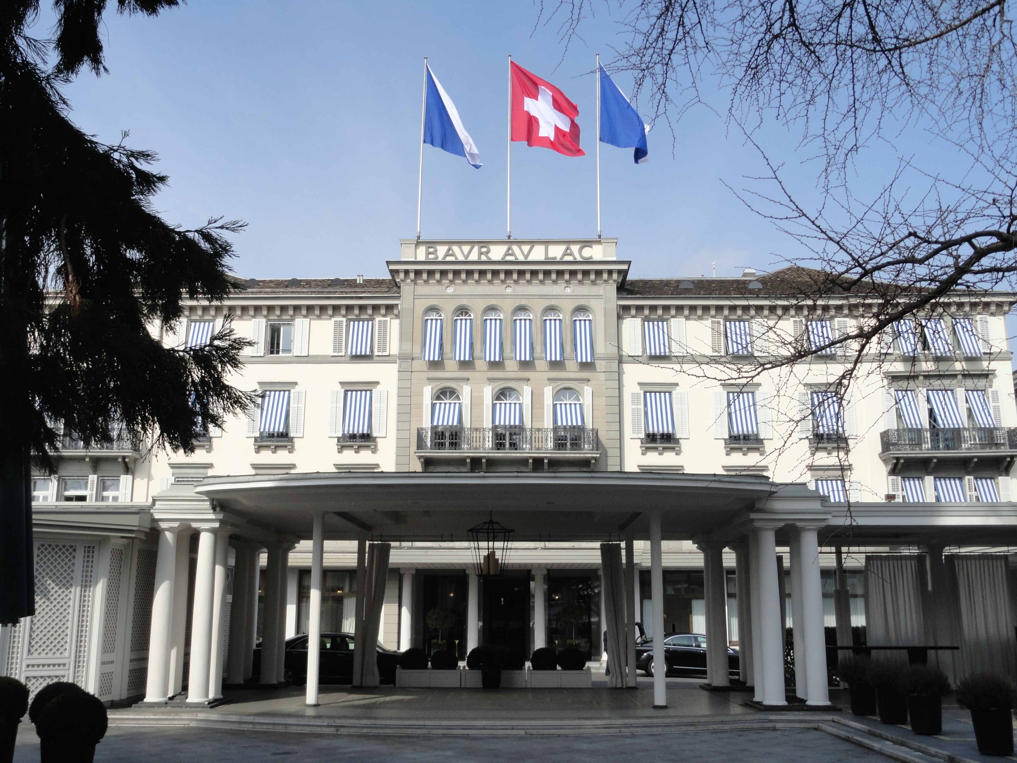 Baur au Lac